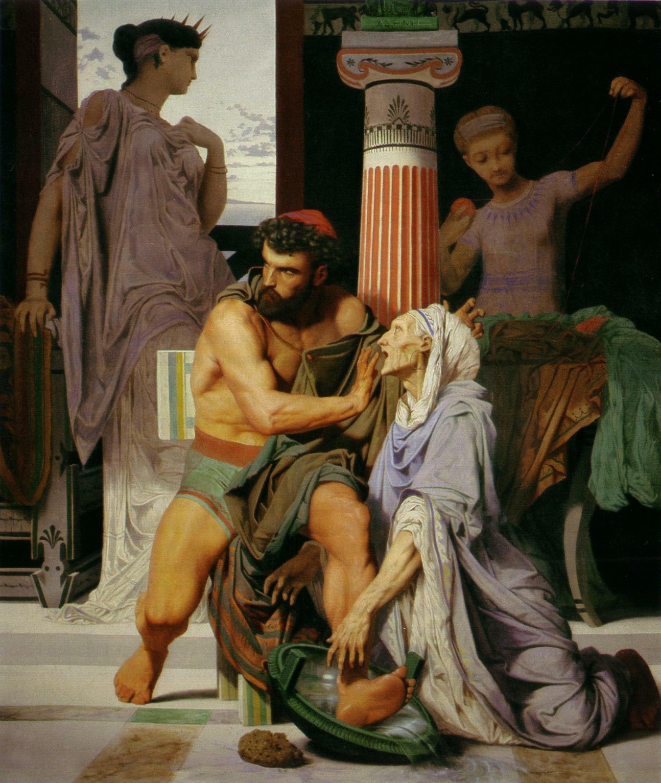 Gustave Boulanger, Ulysse reconnu par Euryclée, 1849, Paris, Ecole Nationale Supérieure des Beaux-Arts